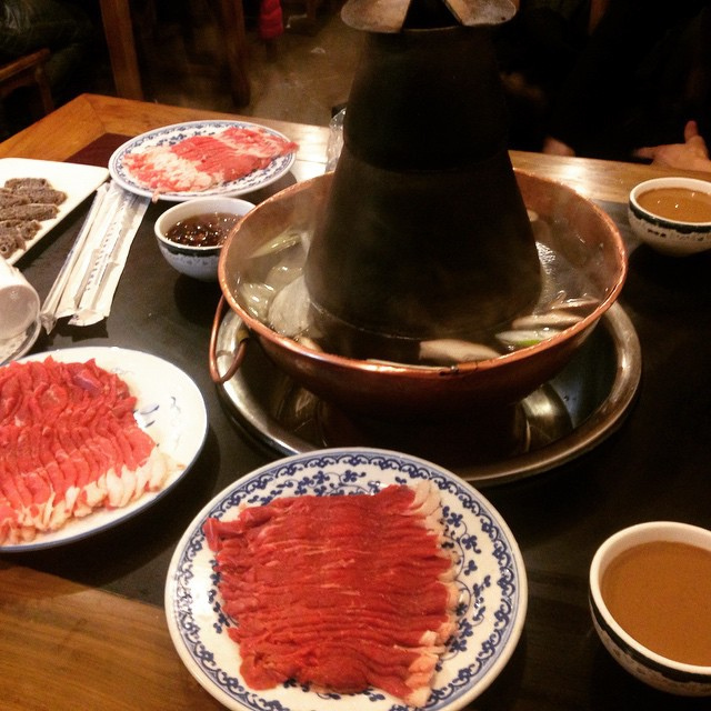 Old beijing Hotpot!!! 裕德孚老北京涮羊肉 鲜羊肉大赞！！